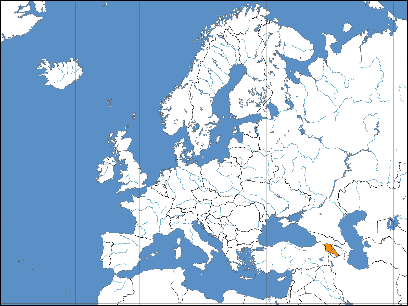 Lage der Republik Armenien in Europa Stand: October 2006